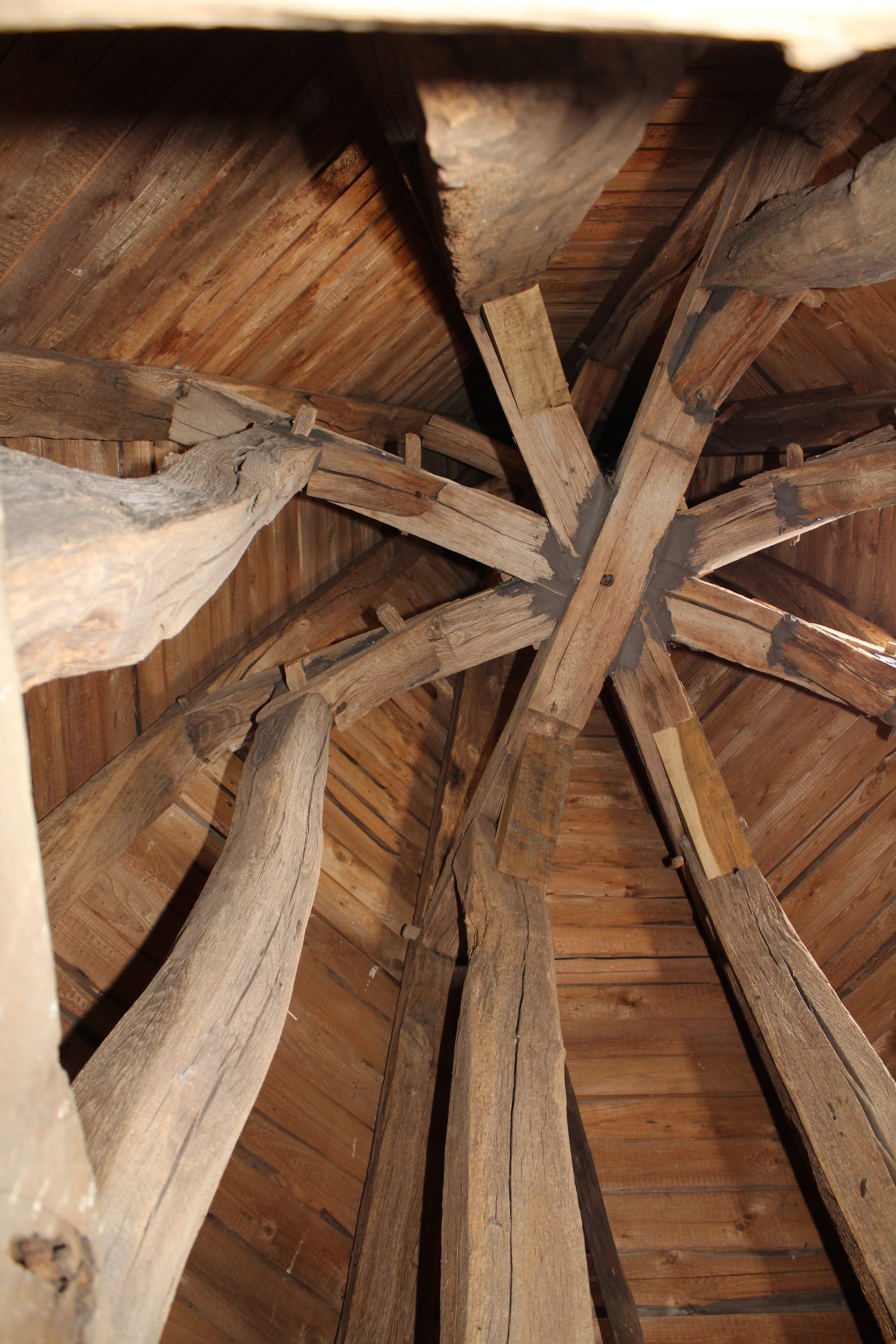 Johanniterkirche Unter-Lais, Nidda, Wetteraukreis, Hessen, Deutschland